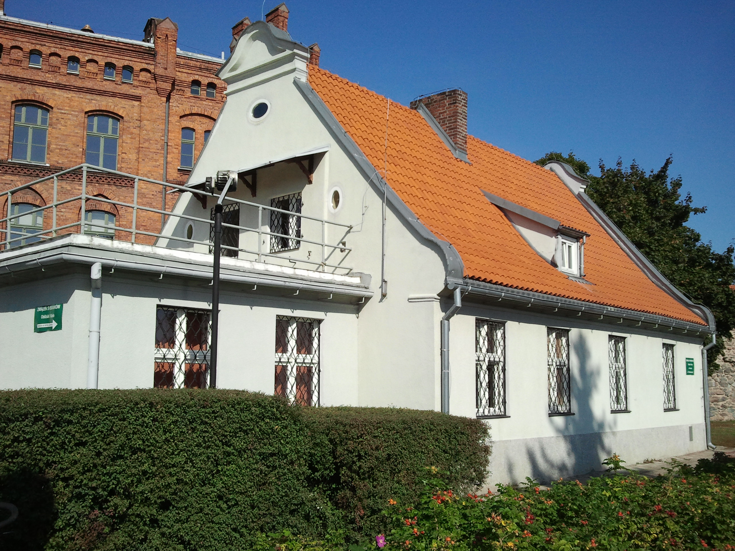 Toruń, ul. Przedzamcze 3 - dom, tzw. Generałówka, k. XVIII w. (zabytek nr A/1555